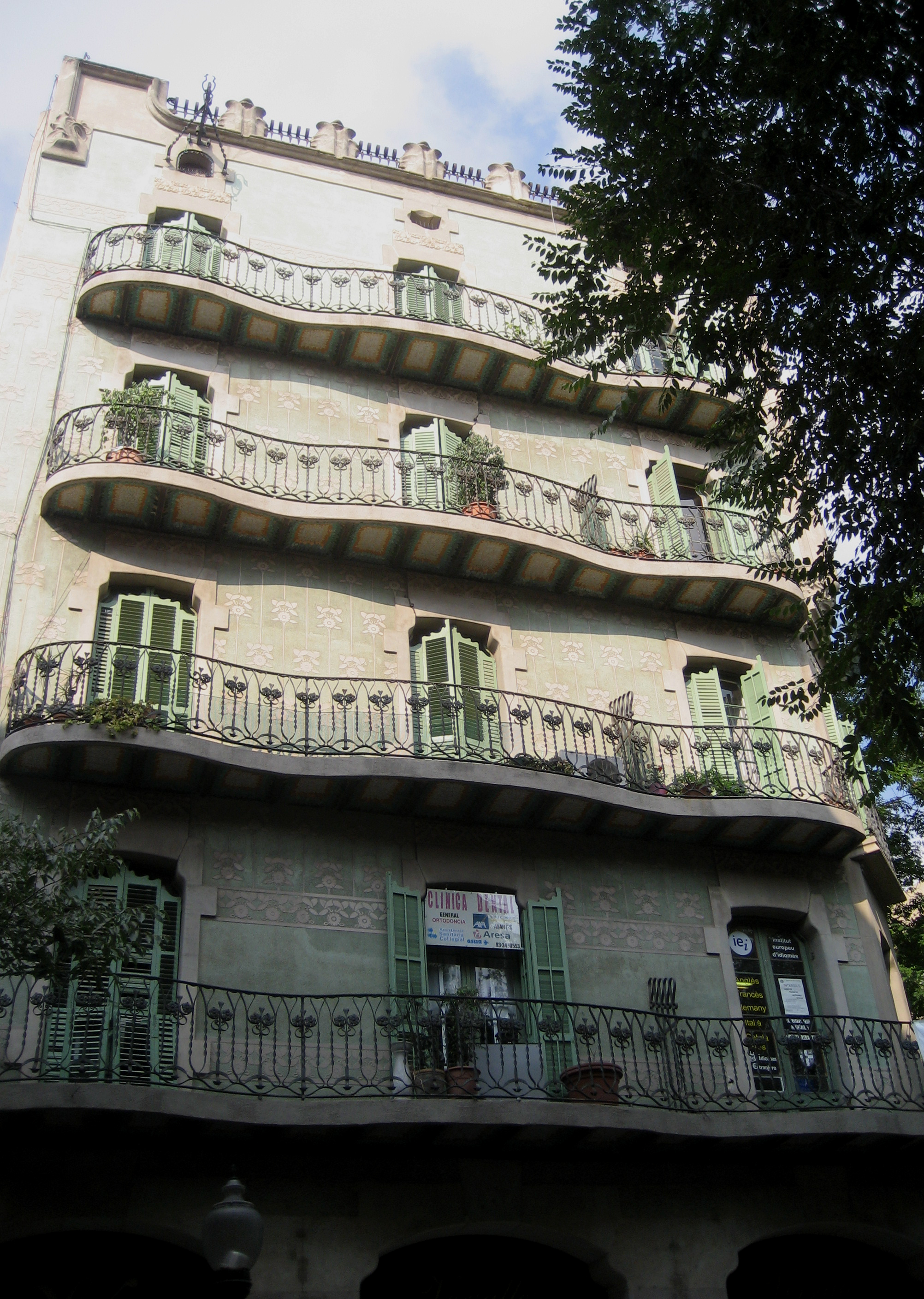 Casa Vidal, estil modernista de l’any 1906 , arquitecte Joan Torras i Guardiola . Vista al c/ Gran de Sant Andreu. Barcelona. Catalunya